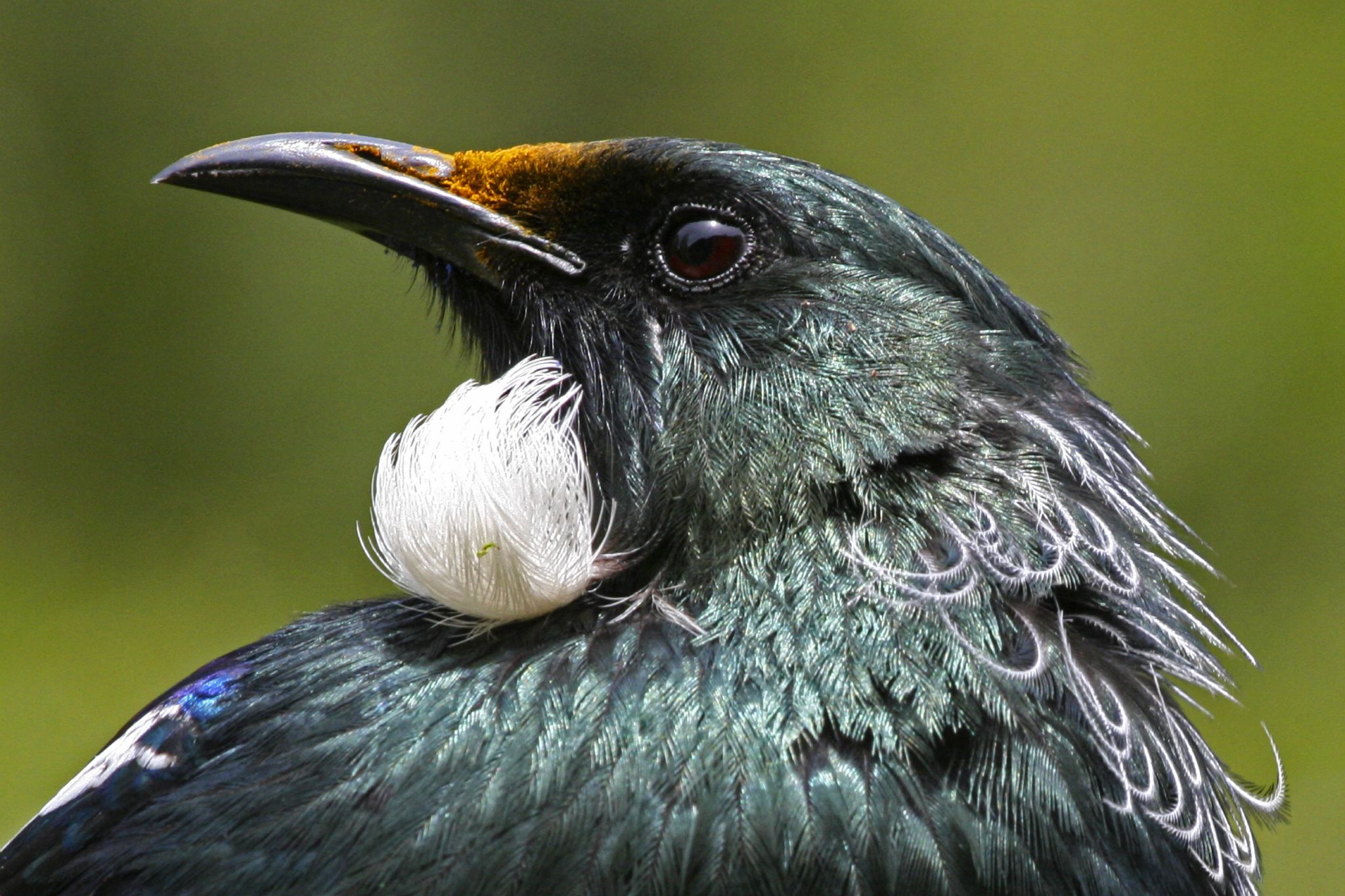 Prosthemadera novaeseelandiaeTui